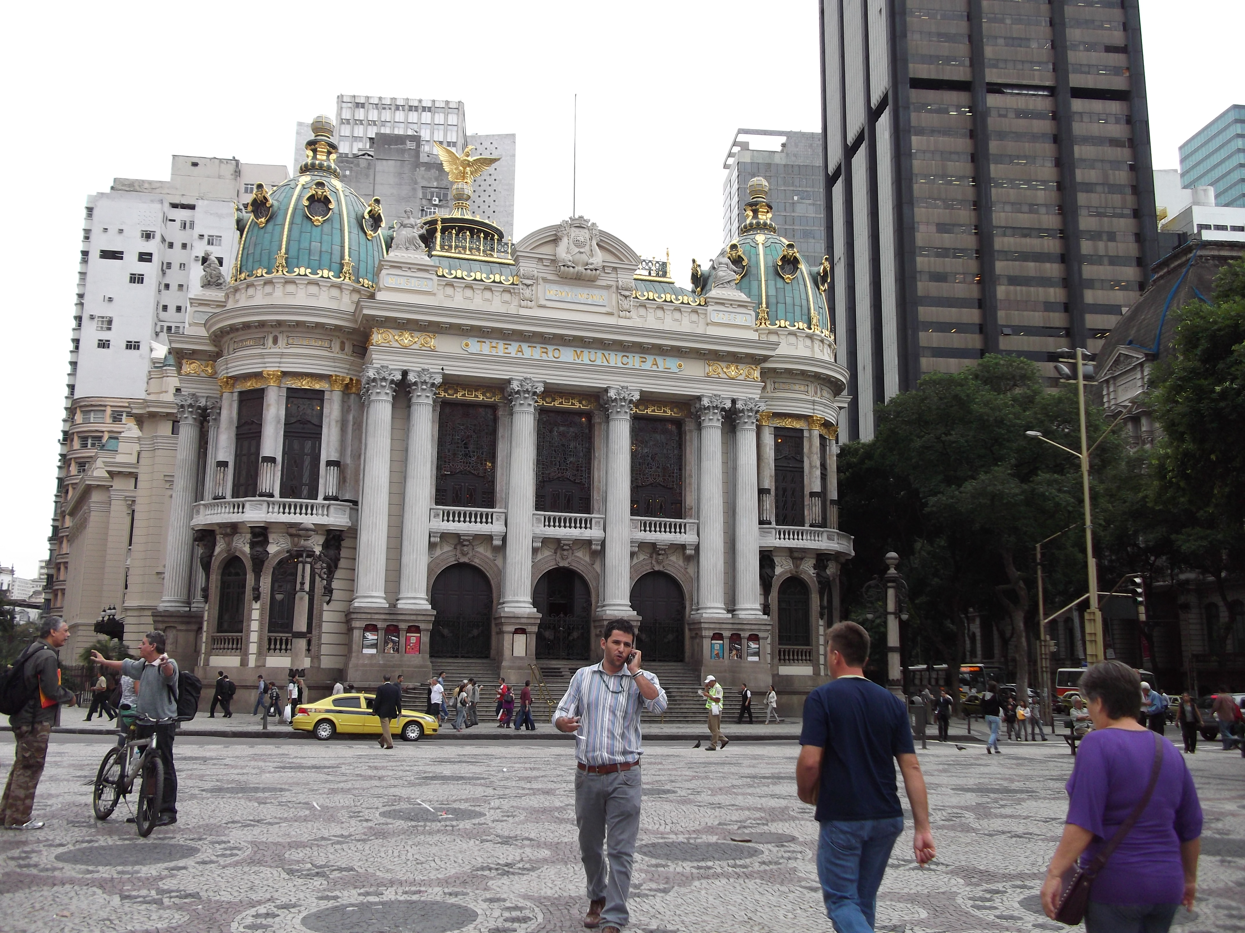 Teatro Municipal do Rio de Janeiro